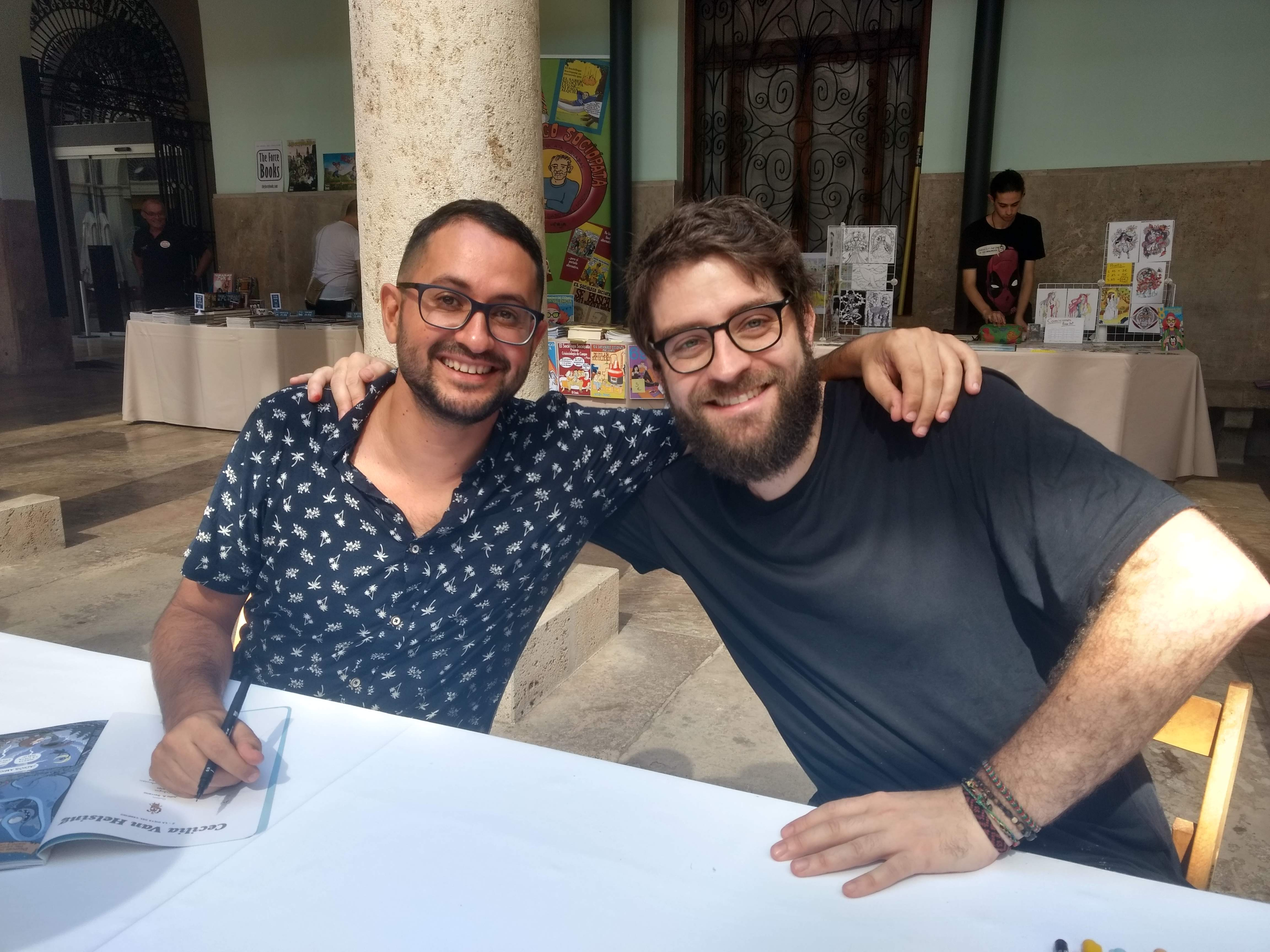 Juanjo Cuerda i Julio A. Serrano a les VIII jornades de còmic de València.